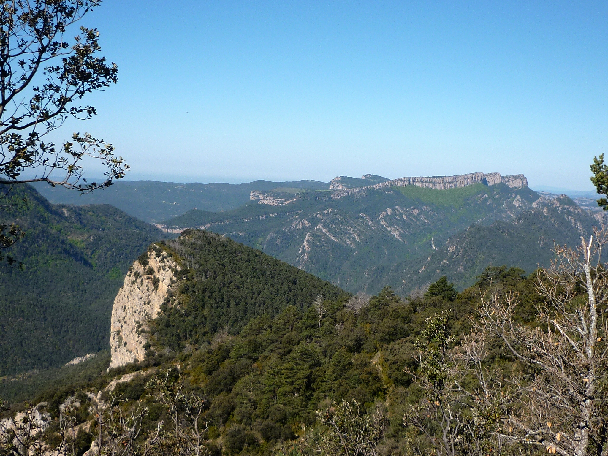 La Rocaterçana, al Serrat de la Corba, des del Grau de l'Olivell, amb Busa al fons. Castellar del Riu (Berguedà - Catalunya)